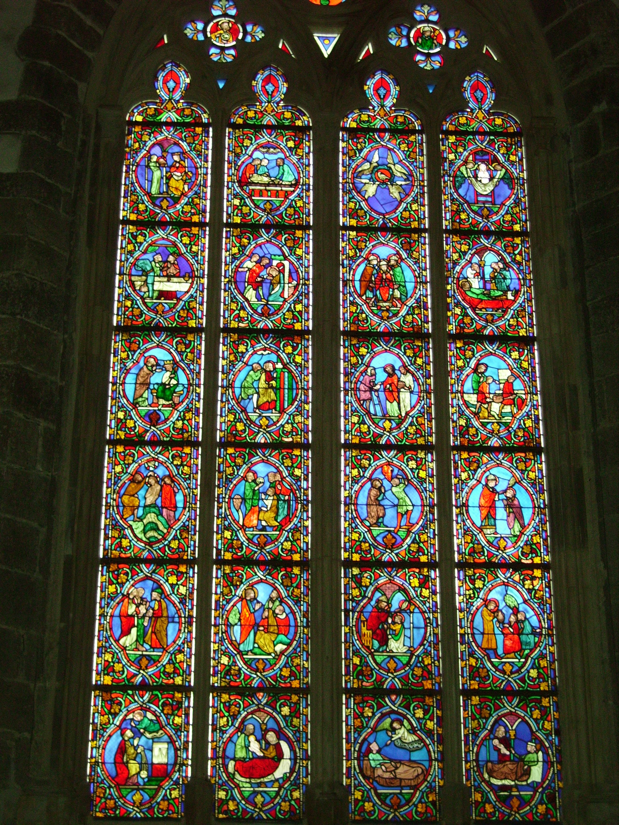 Vitralo de Adolphe Steinheil en la preĝejo de Hillion. Scenoj de la vivo de Sankta Briego 1855